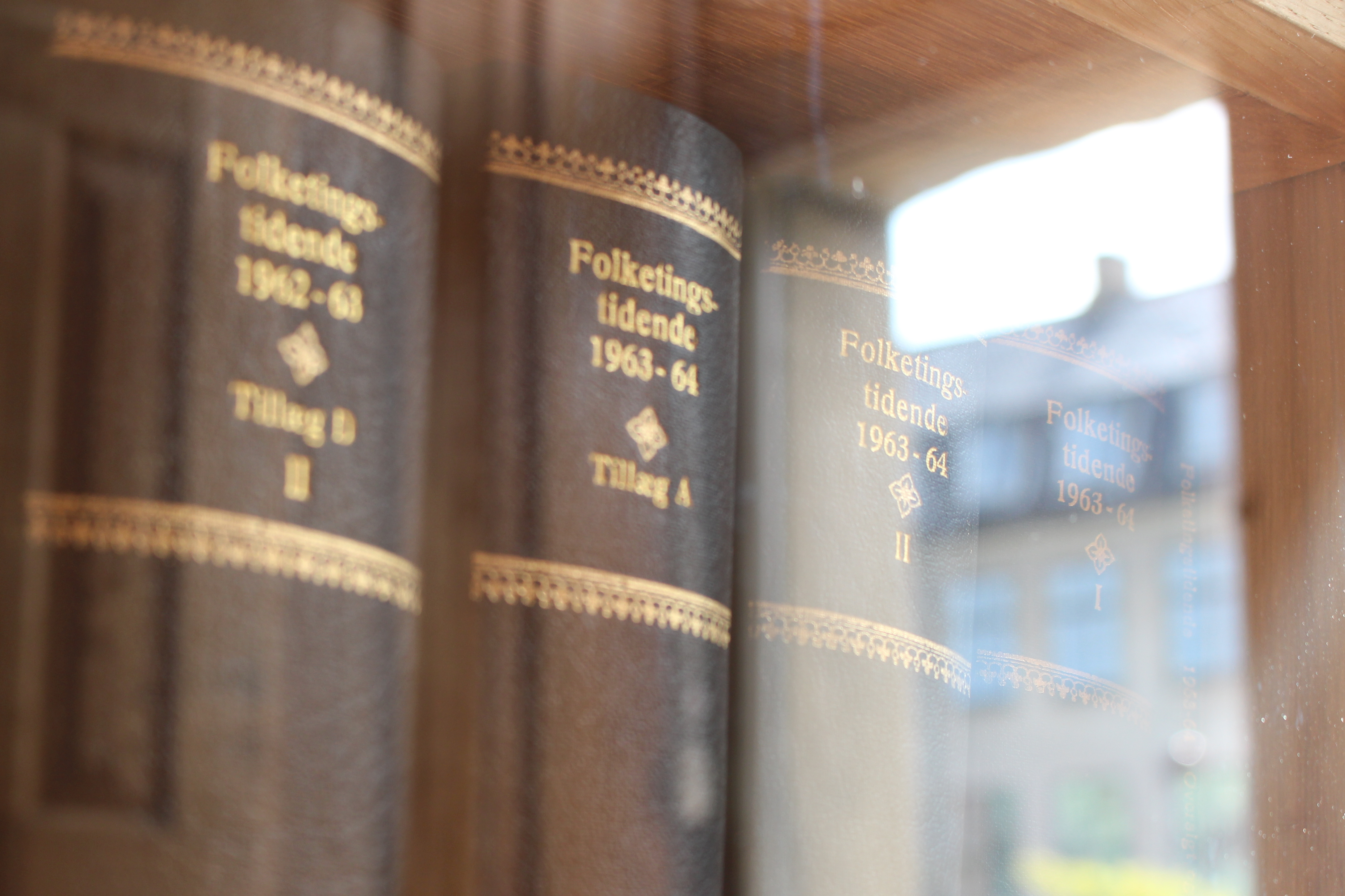 Bøger med Folketingstidende opstillet i Børsbygningen hos Dansk Erhverv med spejling af bygninger fra Slotholmsgade i glaslågen.